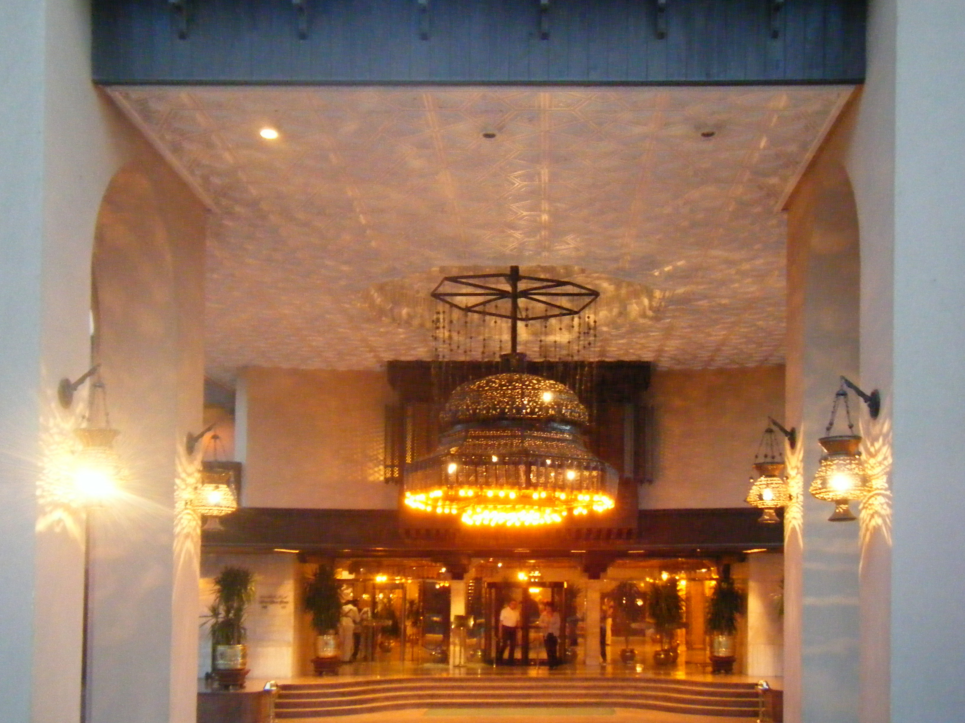 Oberoi hotel light2